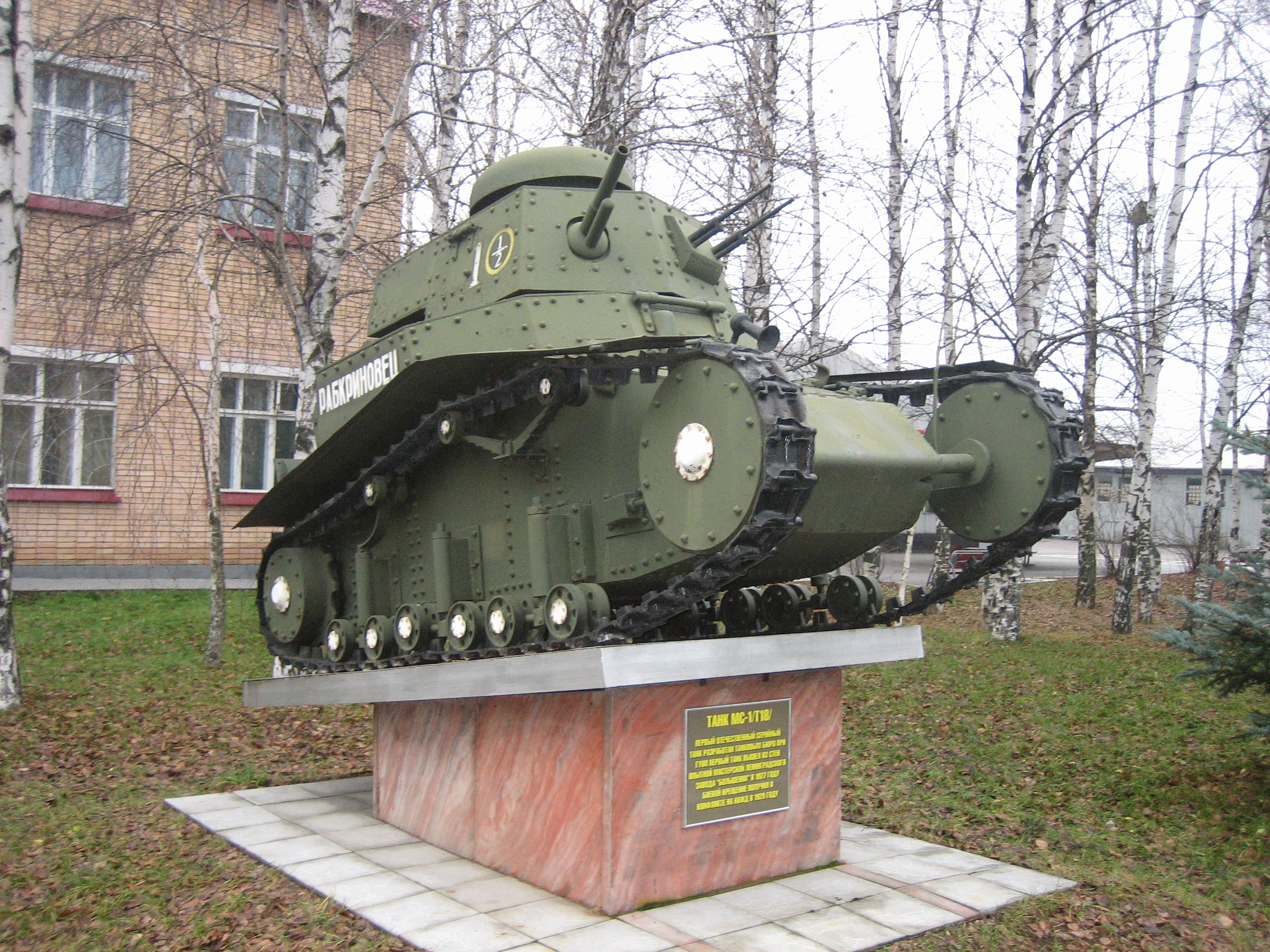 Soviet tank T-18, displayed in Kubinka Tank Museum. Data: see metadata. Source: Photo by me, User:Saiga20K.